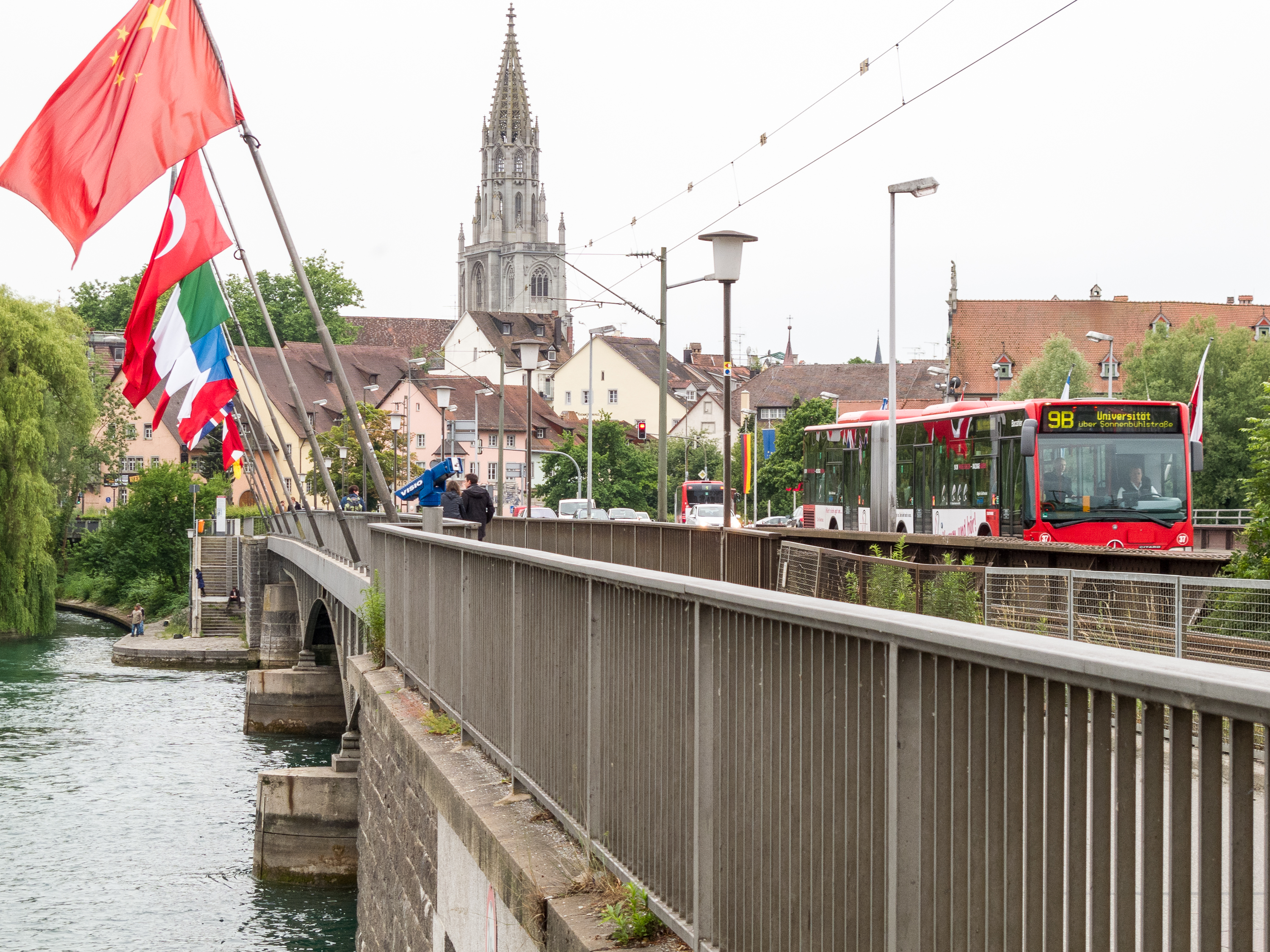 Rheinbrücke Konstanz mit dem Münsterturm im Hintergrund (Juni 2011)